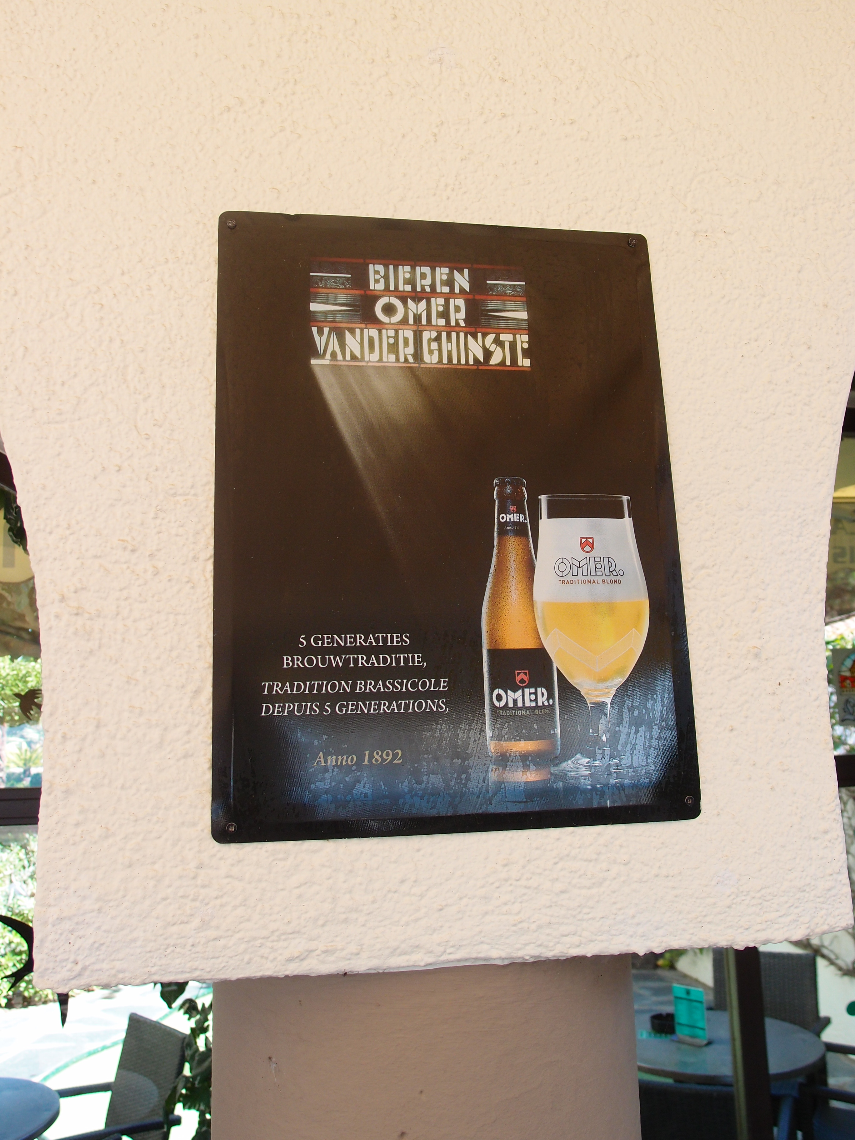 OMER-Außenwerbung in Roses (belg. Brauerei Bockor) Datum: 05.09.2013 Urheber: M. Pfeiffer alias Gordito1869 Quelle: Privates Fotoarchiv des Urhebers